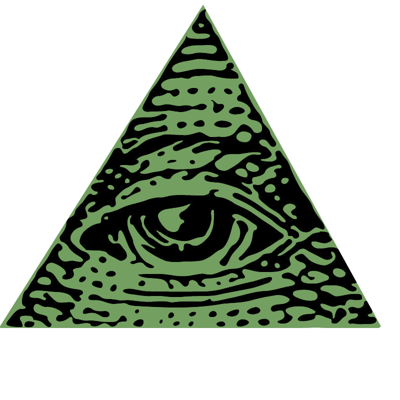 Illuminati